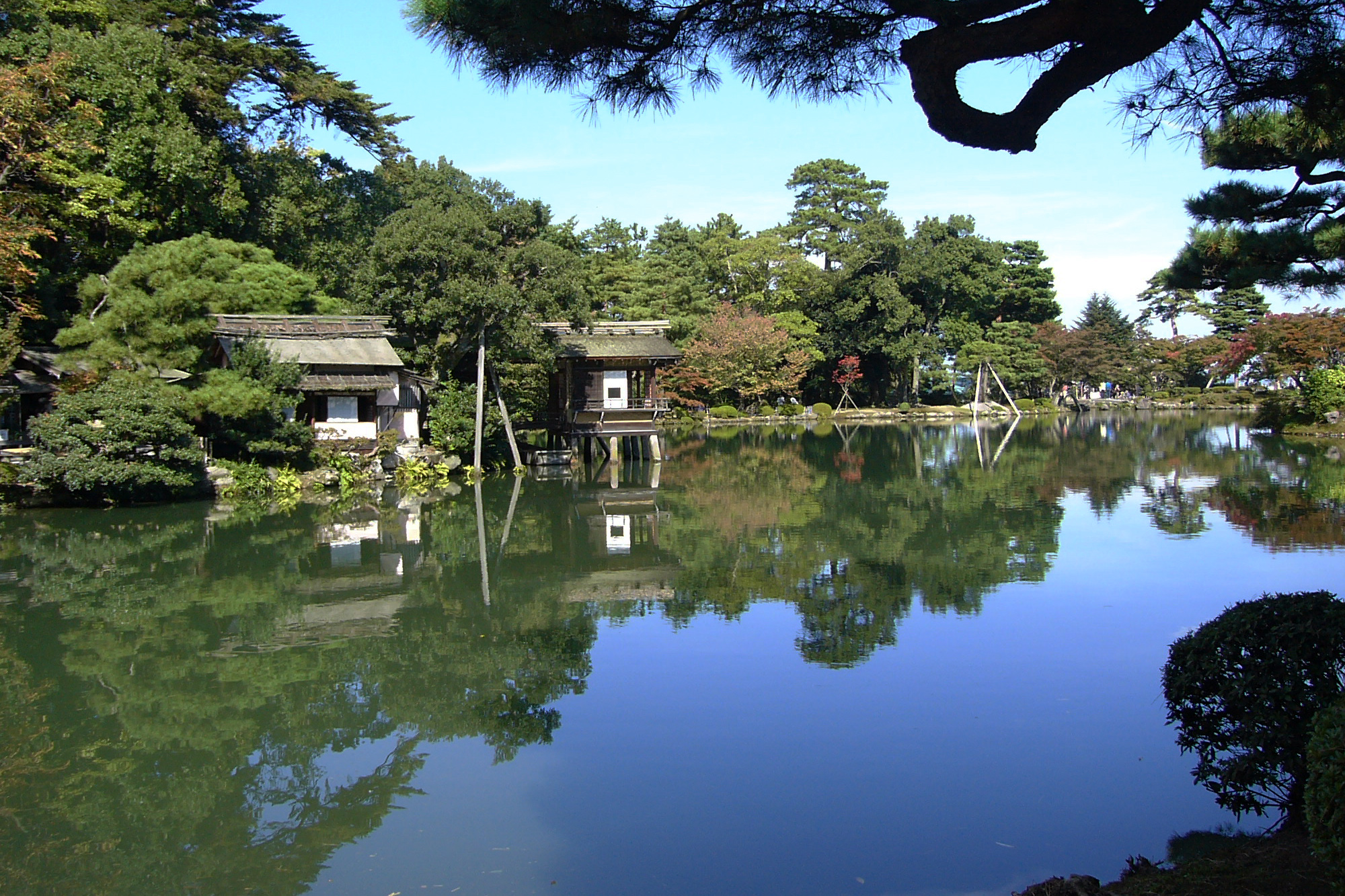 Kenrokuen (兼六園), Kanazawa, Ishikawa, Japan